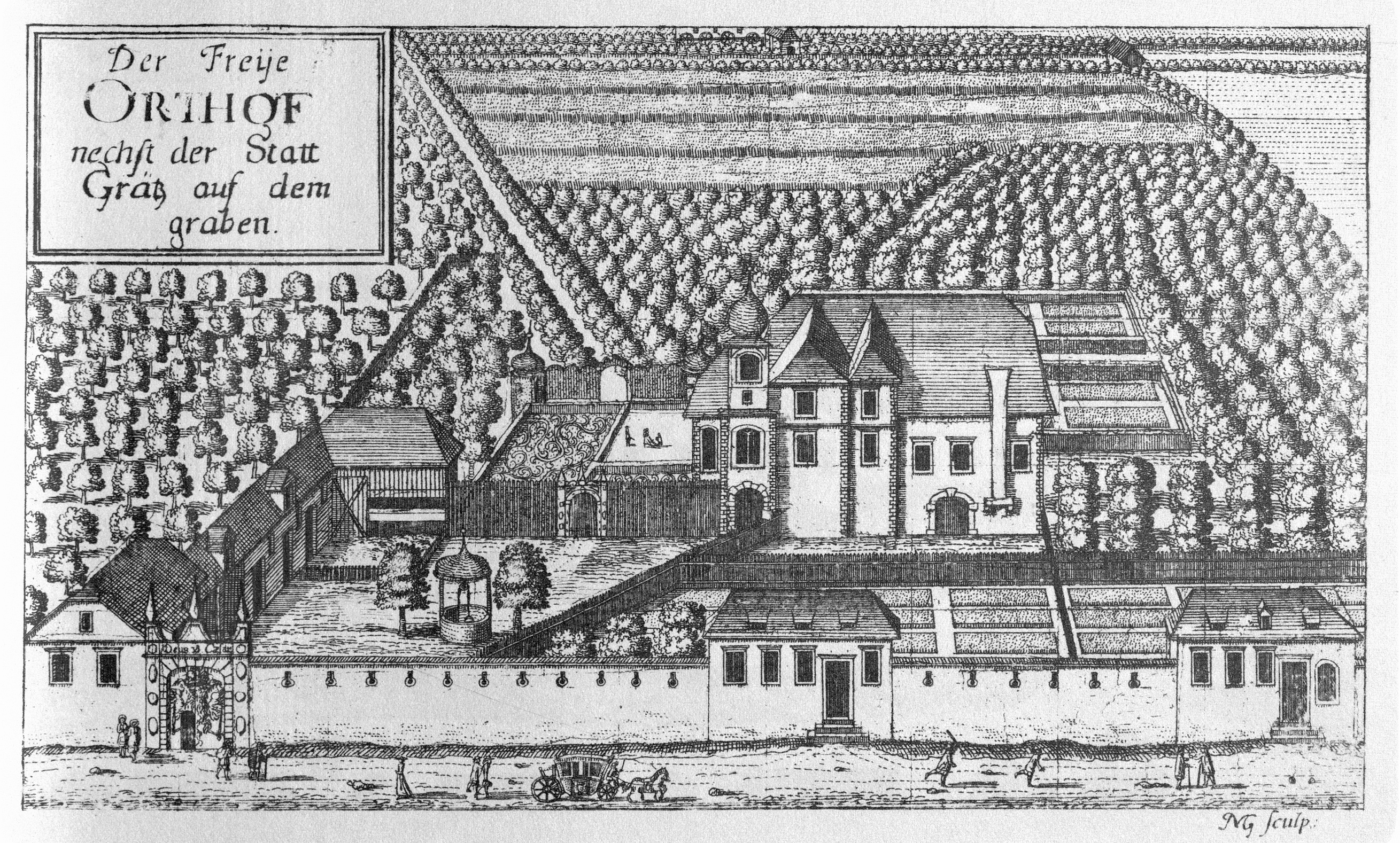 G. M. Vischers Käyserlichen Geographi, Topographia Ducatus Stiriae, Das ist: Eigentliche Delineation / und Abbildung aller Städte / Schlösser / Marcktfleck / Lustgärten / Probsteyen / Stiffter / Clöster und Kirchen / so es sich im Herzogthumb Steyrmarck befinden; Und anjetzo Umb einen billichen Preyß zu finden seynd Bey Johann Bitsch Universitäts Buchhandlern / Auff dem Juden=Platz bey der guldenen Saulen. Graz 1681 Die Nummerierung der Dateien folgt der alphabetischen Reihung der Ortsnamen